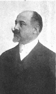 Fotografía del pintor español Joaquín Luque Roselló publicada en 1913